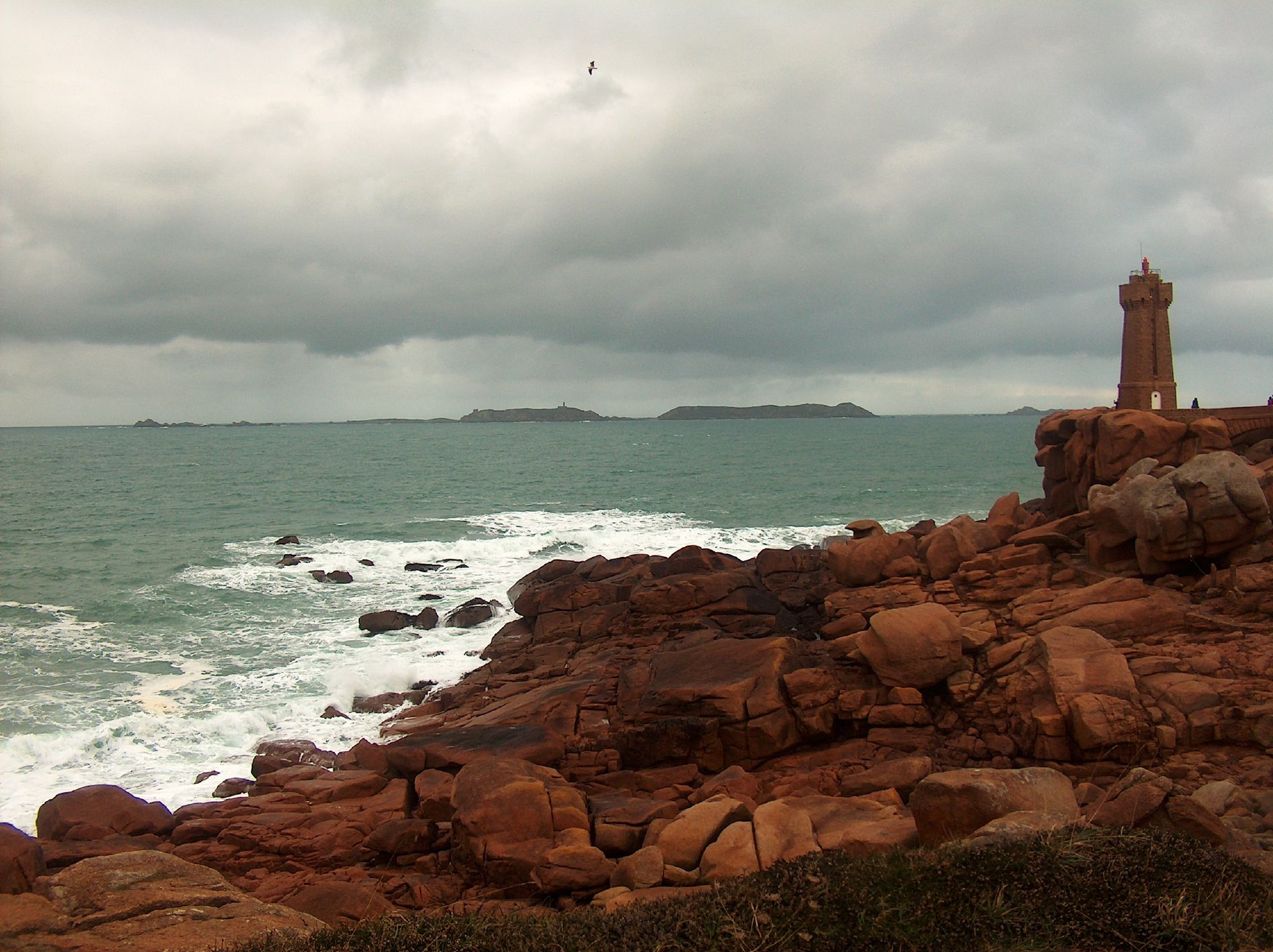 Pointe de Squewel et feu de Ploumanac'h. En arrière-plan on aperçoit de gauche à droite le cerf, l'Île Plate, l'Île aux Moines (avec le phare), l'Île Bono et l'Île Malban faisant partie de l'archipel des Sept Îles.